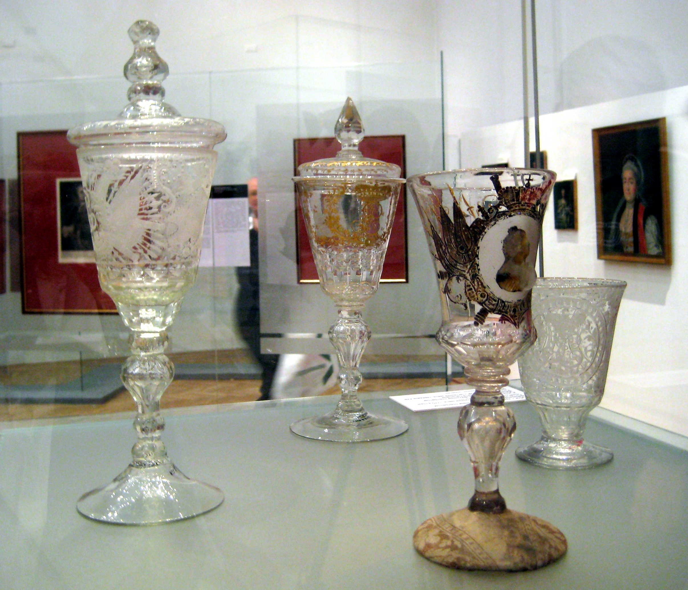 Кубок с рельефным профильным портретом императрицы Анны Иоанновны с надписью Vivat Anne Imperatrice de Roussic. Саксония, 18 век. Стопа с профильным портретом императрицы Елизаветы Петровны. Россия, Петербургский стеклянный завод, 18 век.